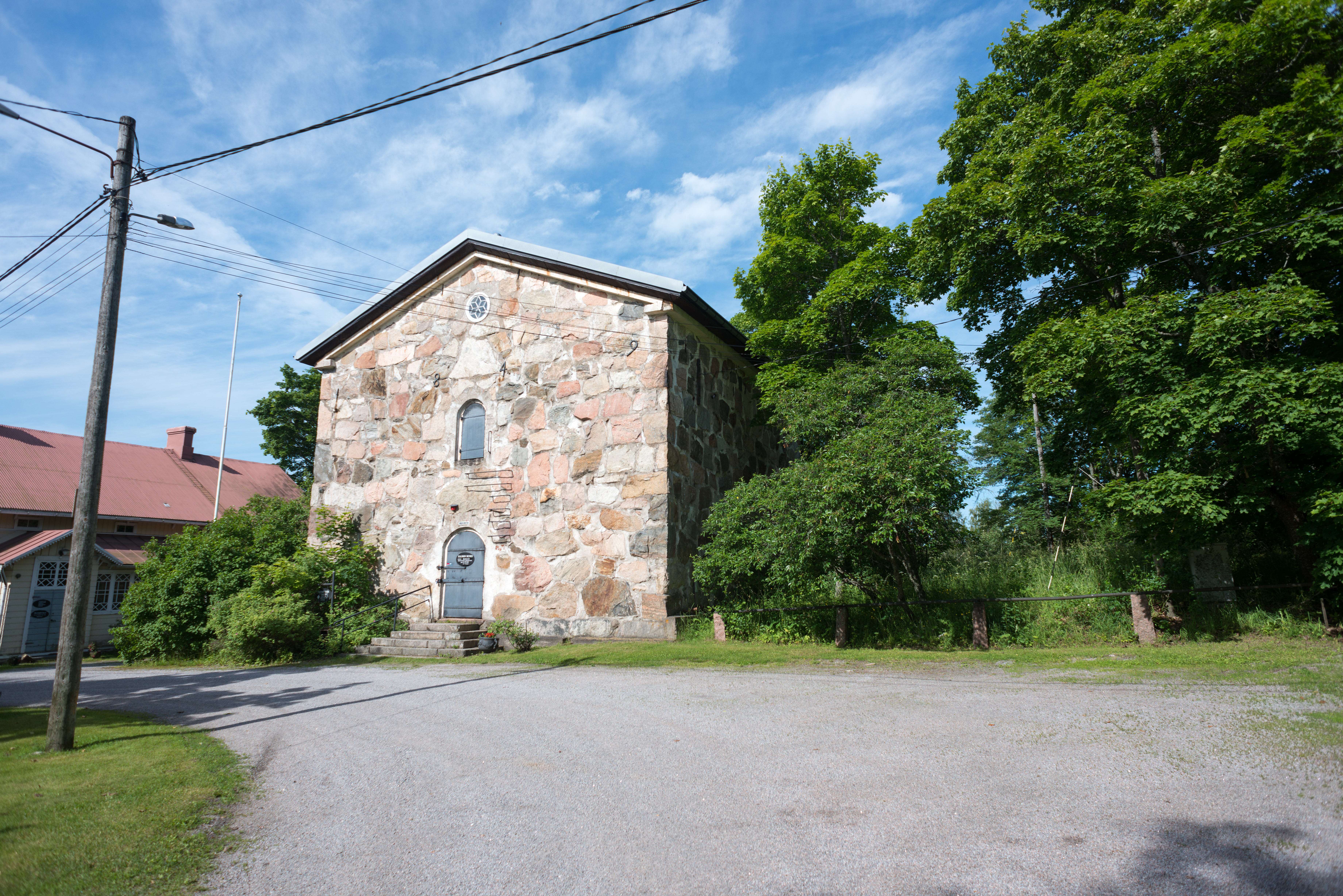 Halikon museo